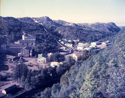 Titania A/S Sandbekk gruver på 1950-tallet